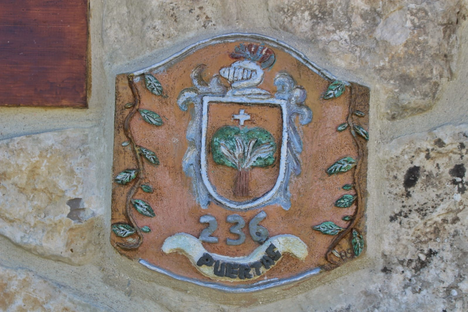 Cartel numérico Bodegas de Baltanás